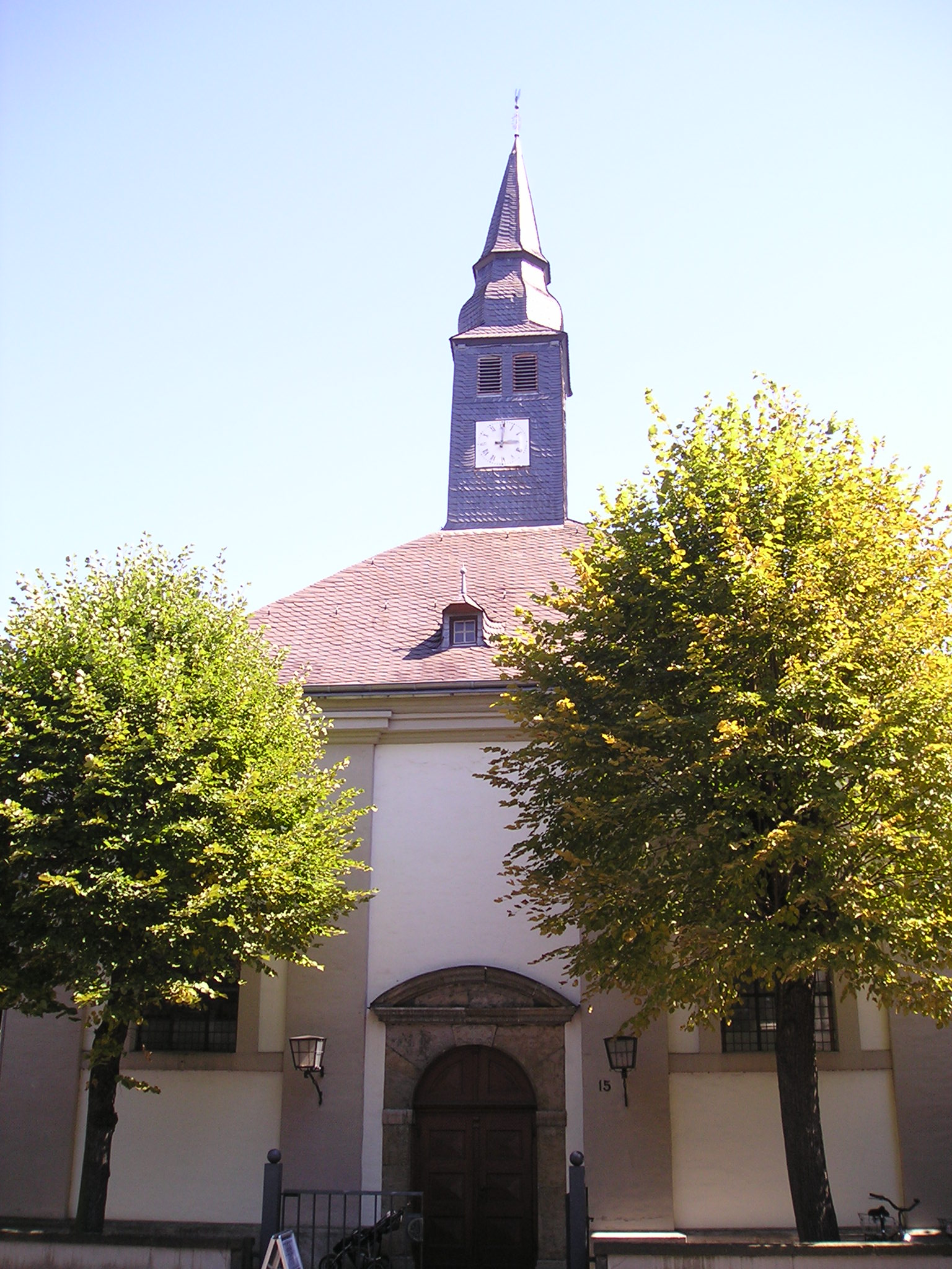 Evangelische Dorfkirche in Düsseldorf-Urdenbach